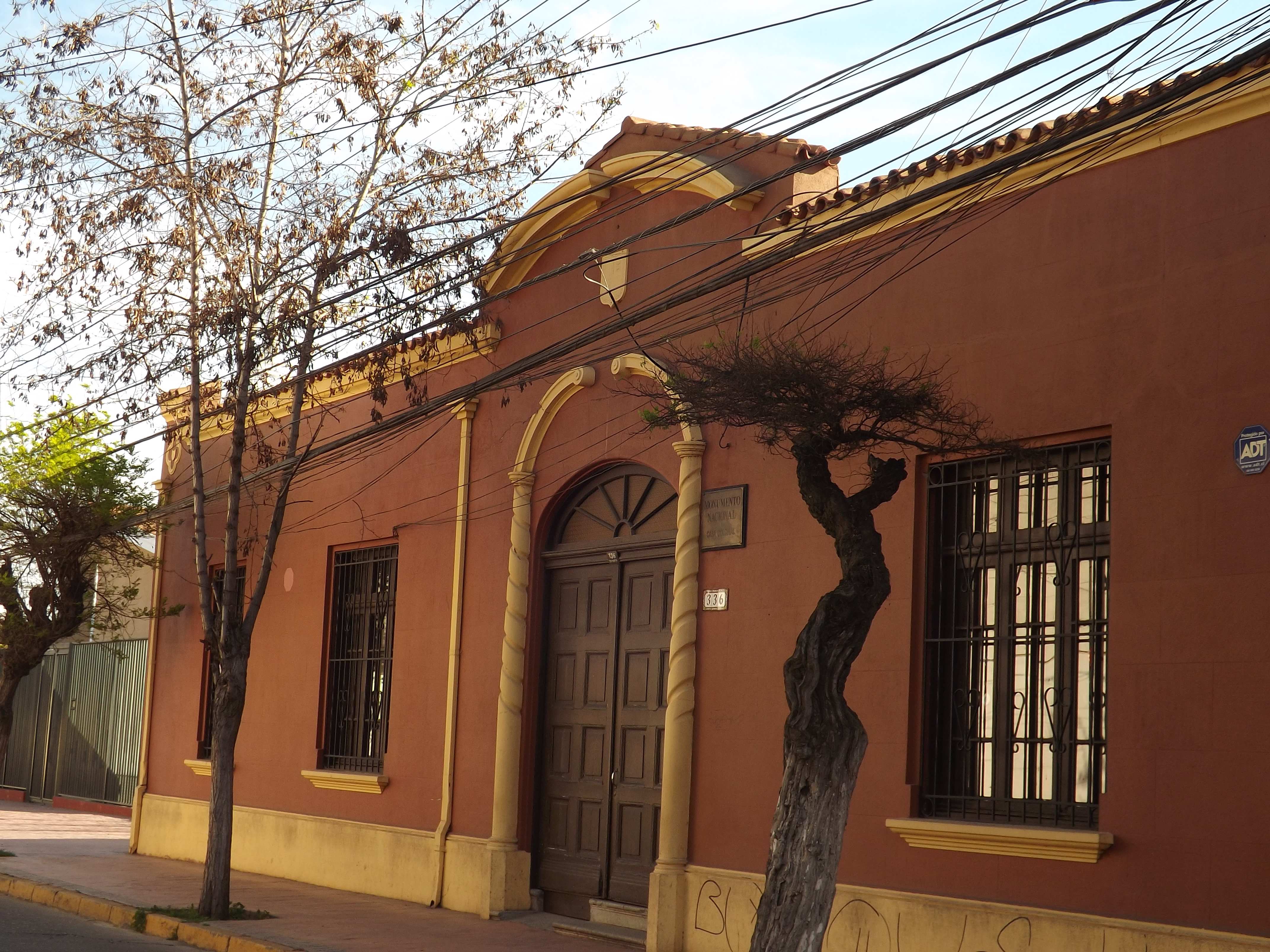 Casa colonial en Quillota This is a photo of a national monument in Chile: 757